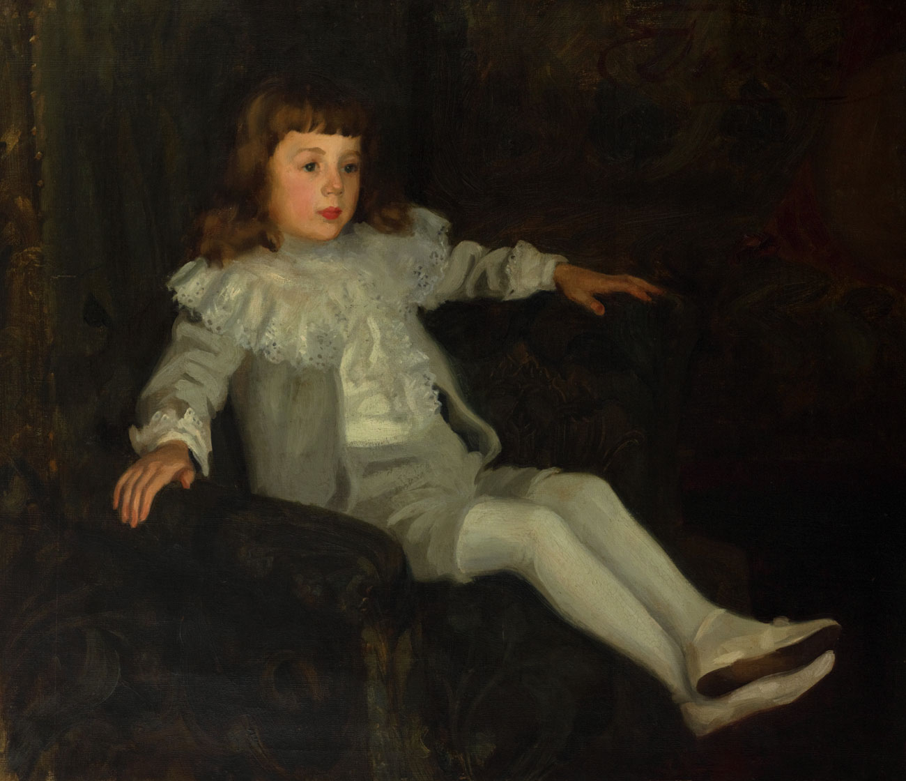 Екатерина Федоровна Юнге. Портрет ребенка, 1877